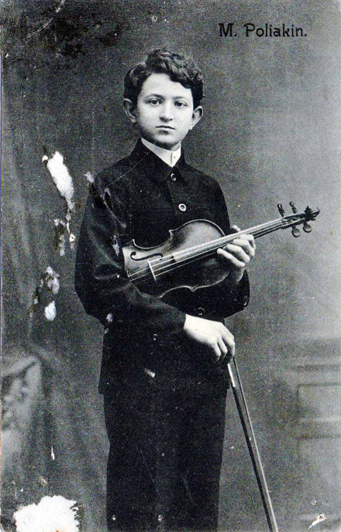 Мирон Полякин на дореволюционной открытке